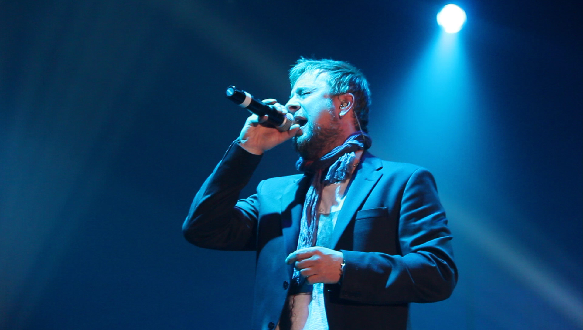 MARCO MASINI - CI VORREBBE IL MARE